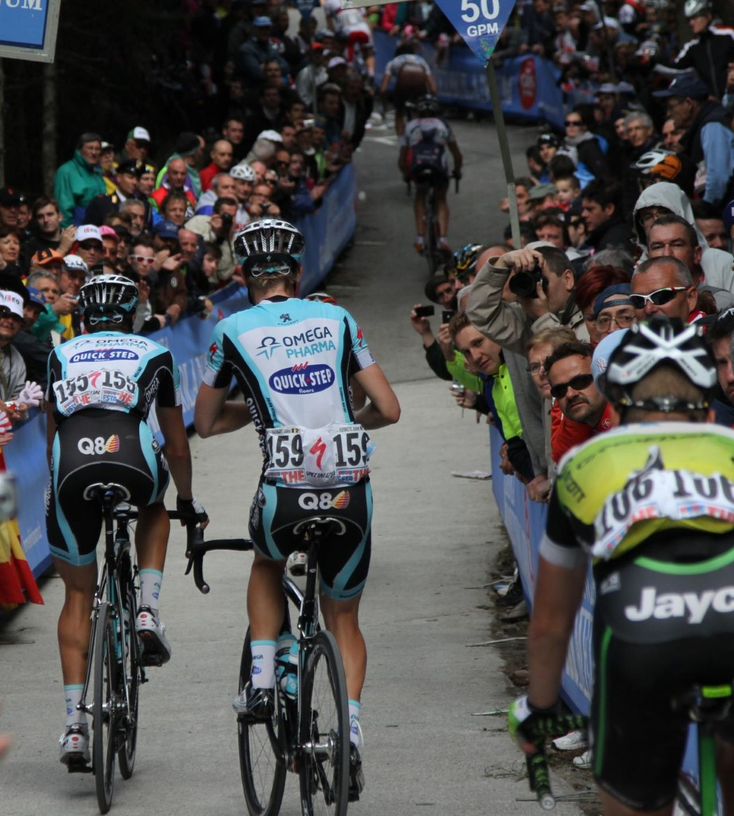 mortirolo 116 maes en vermote